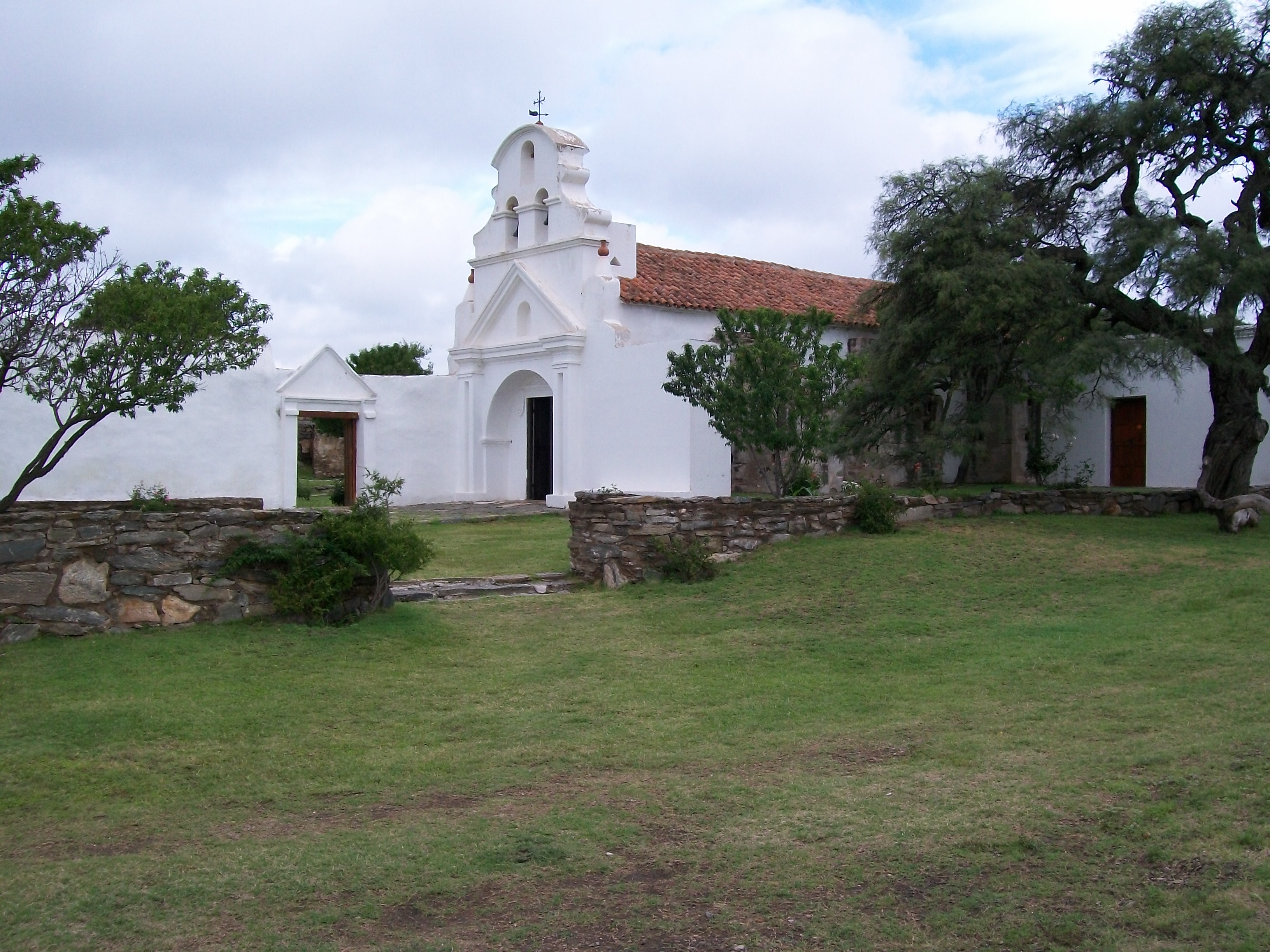 Capilla de la estancia jesuítica de La candelaria. Córdoba, Argentina.